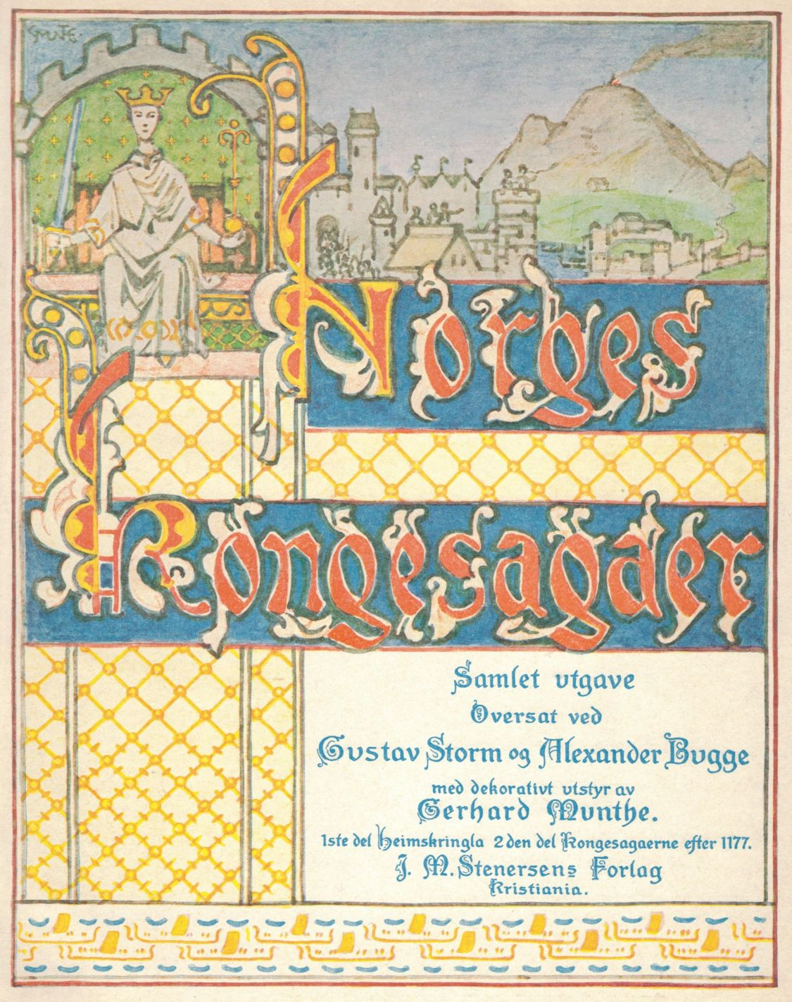 Tittelblad 1914-utgaven av Norges kongesagaer.